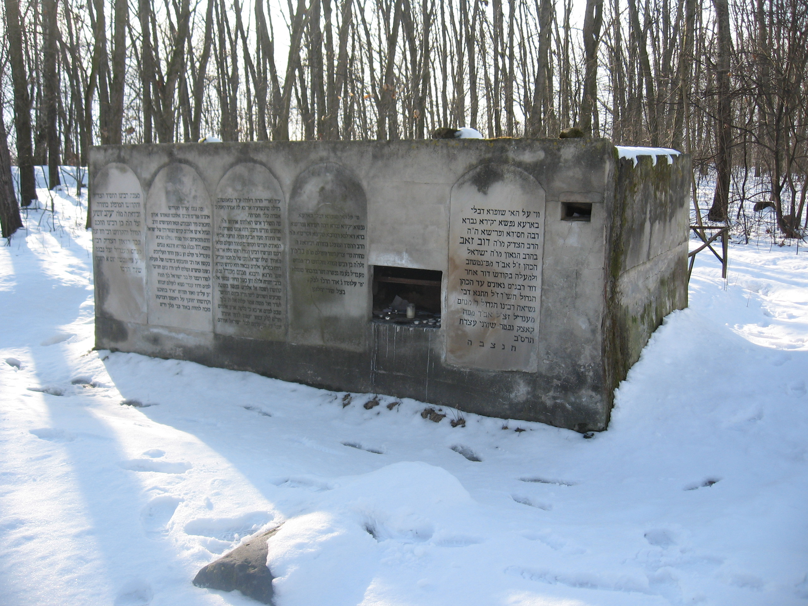 קבר רבי מנחם מנדל (מצבה שלישית משמאל- ההנצחה הכי ארוכה), שנים מבניו: רבי דוד מורגנשטרן (משמאל לו) ורבי בנימין (מימין לו), נכדו: רבי יעקב יושע (המצבה הראשונה משמאל) וחתנו: רבי דוד זאב (המצבה הראשונה מימין) בבית הברות היהודי בקוצק